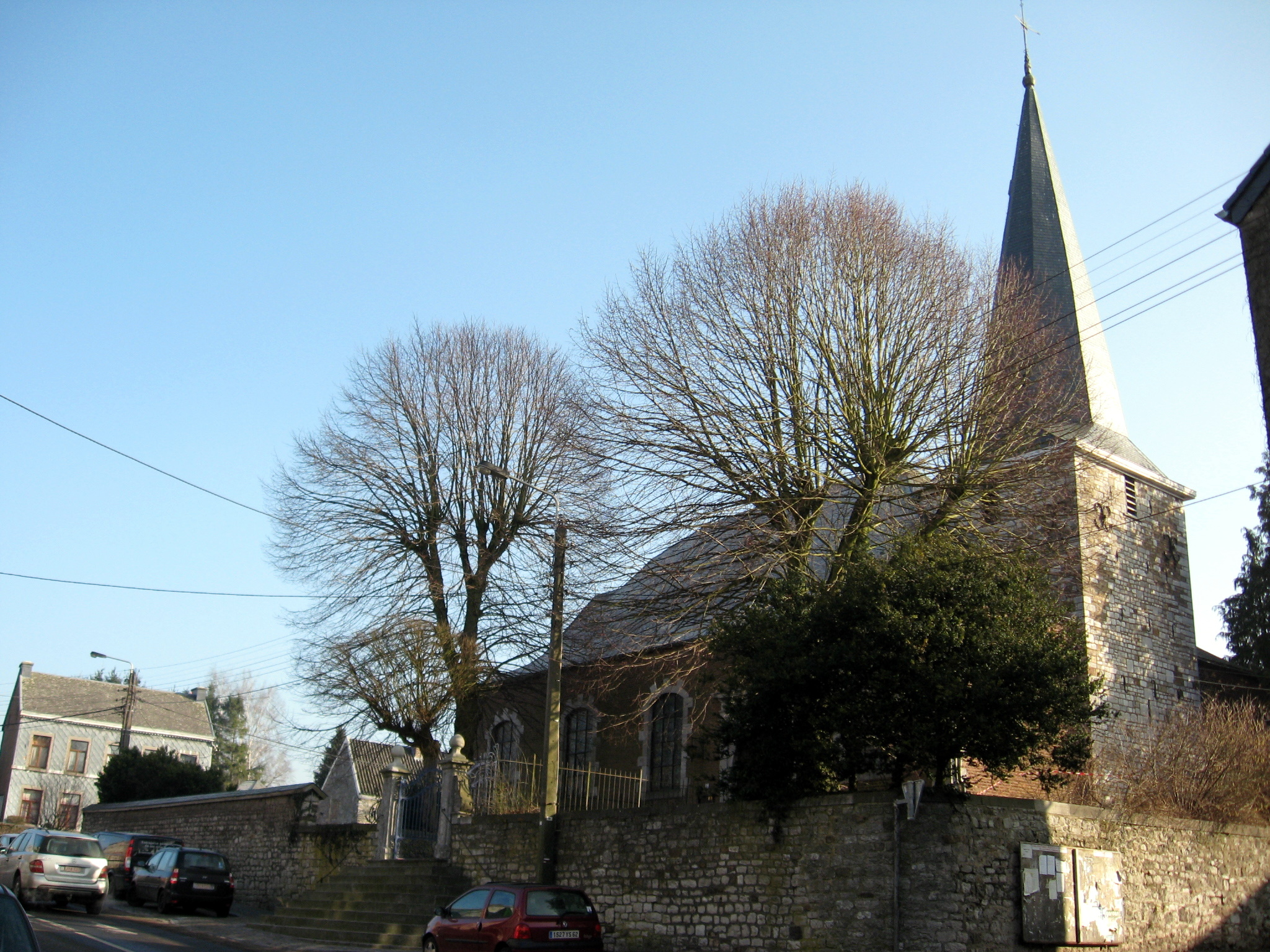 Sint-Sebastiaanskerk in Olne